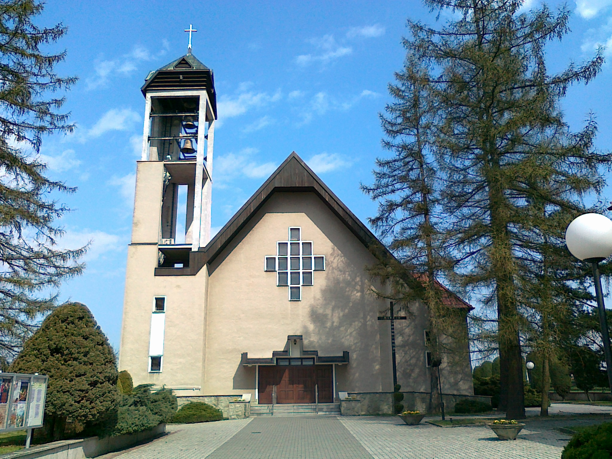 Kościół św. Franciszka z Asyżu i św. Jacka w Kędzierzynie-Koźlu